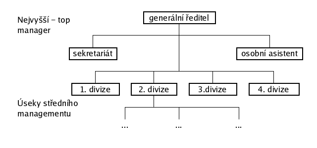 Jednoduchý obecný diagram divizionální struktury. Autor: Petr K.